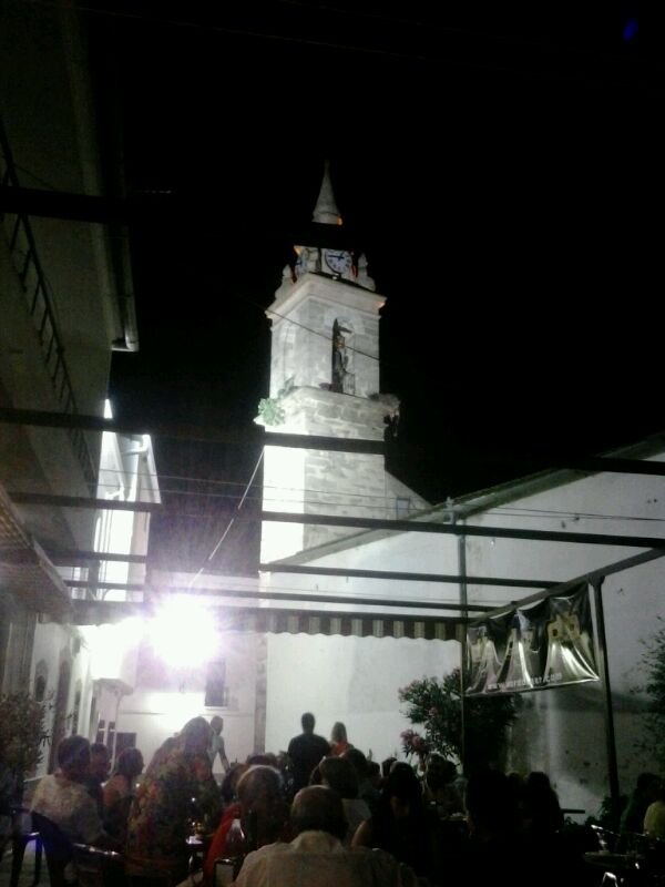 Iglesia de San Pedro. Verano de 2013